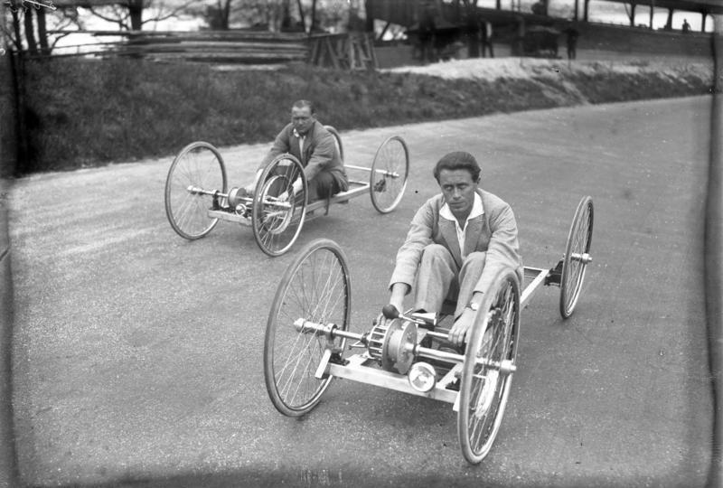 Sportsfreunde des Land-Skiffs ! Landskiff-Fahrer während der Fahrt. Durch Ziehen an einem Riemen wird das Fahrzeug bis zu 40 km. in der Stunde vorwärtsgebracht.